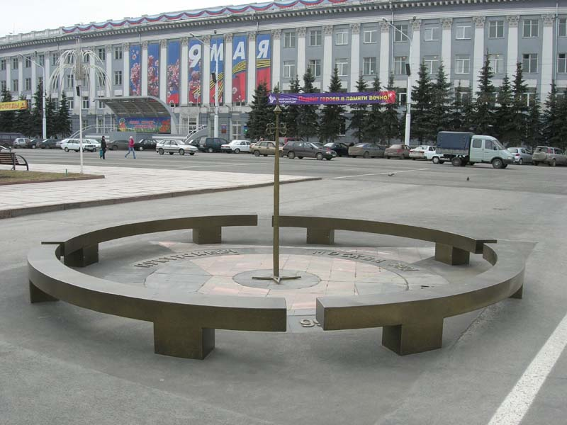 Площадь Советов Центр города Кемерово Центральная административная площадь Советов, город Кемерово. На площади расположена Администрация Кемеровской области и городская, представитель презедента РФ, Федерация Профсоюзных Организаций Кузбасса.